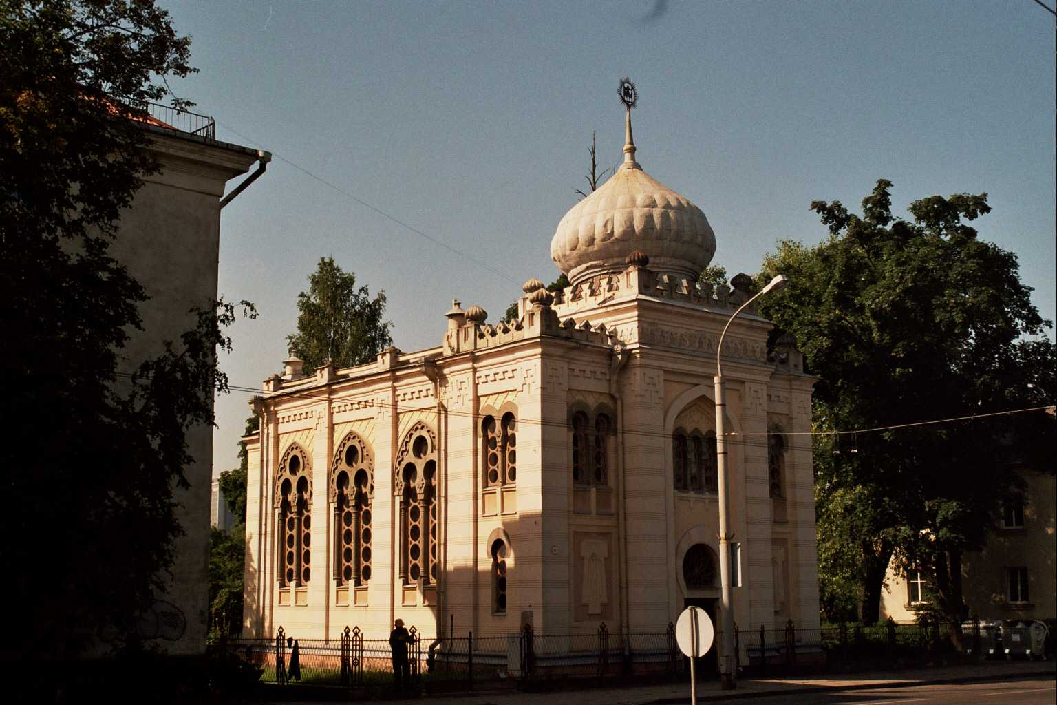 Mi faris tiun foton.